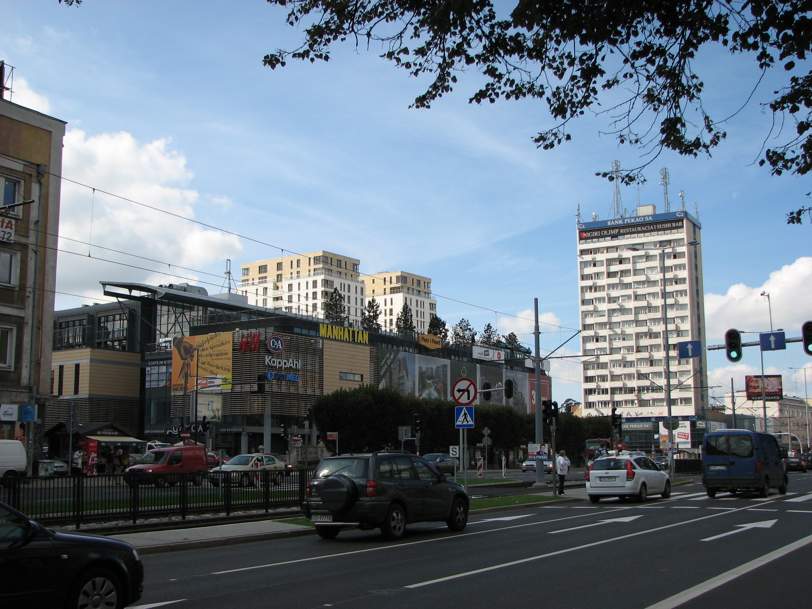 Współczesne centrum Wrzeszcza